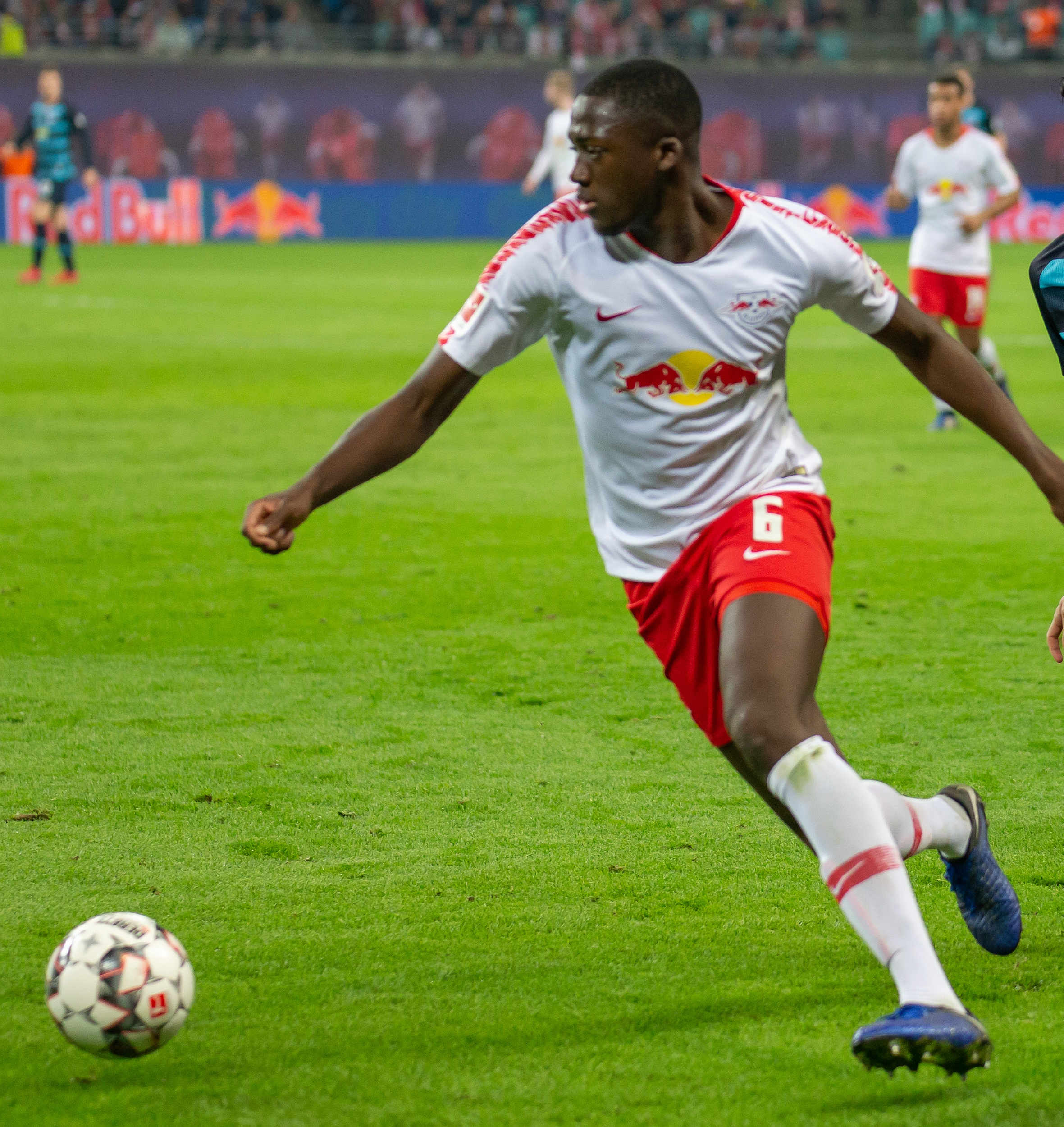 Fußball, Männer, 1. Bundesliga, RB Leipzig - Hertha BSC; Ibrahima Konate (RB Leipzig, 6)